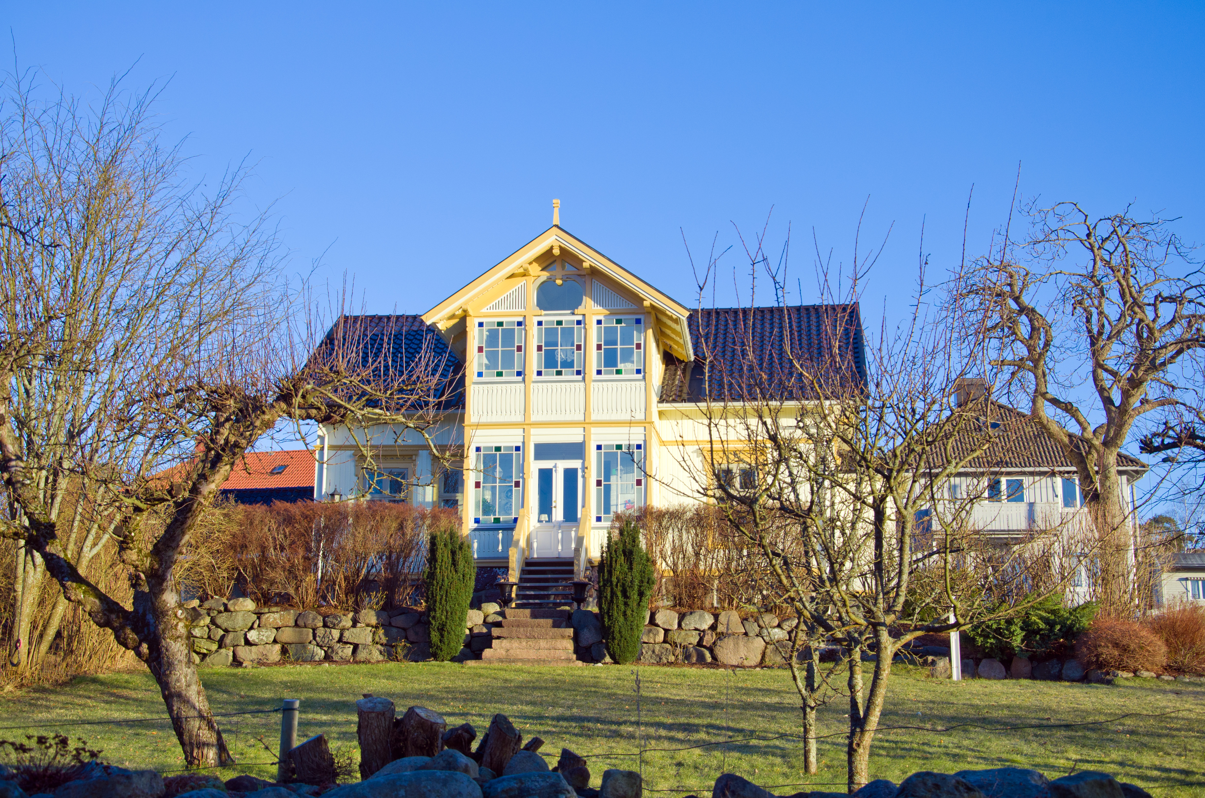 Grevinneveien 6, Tønsberg